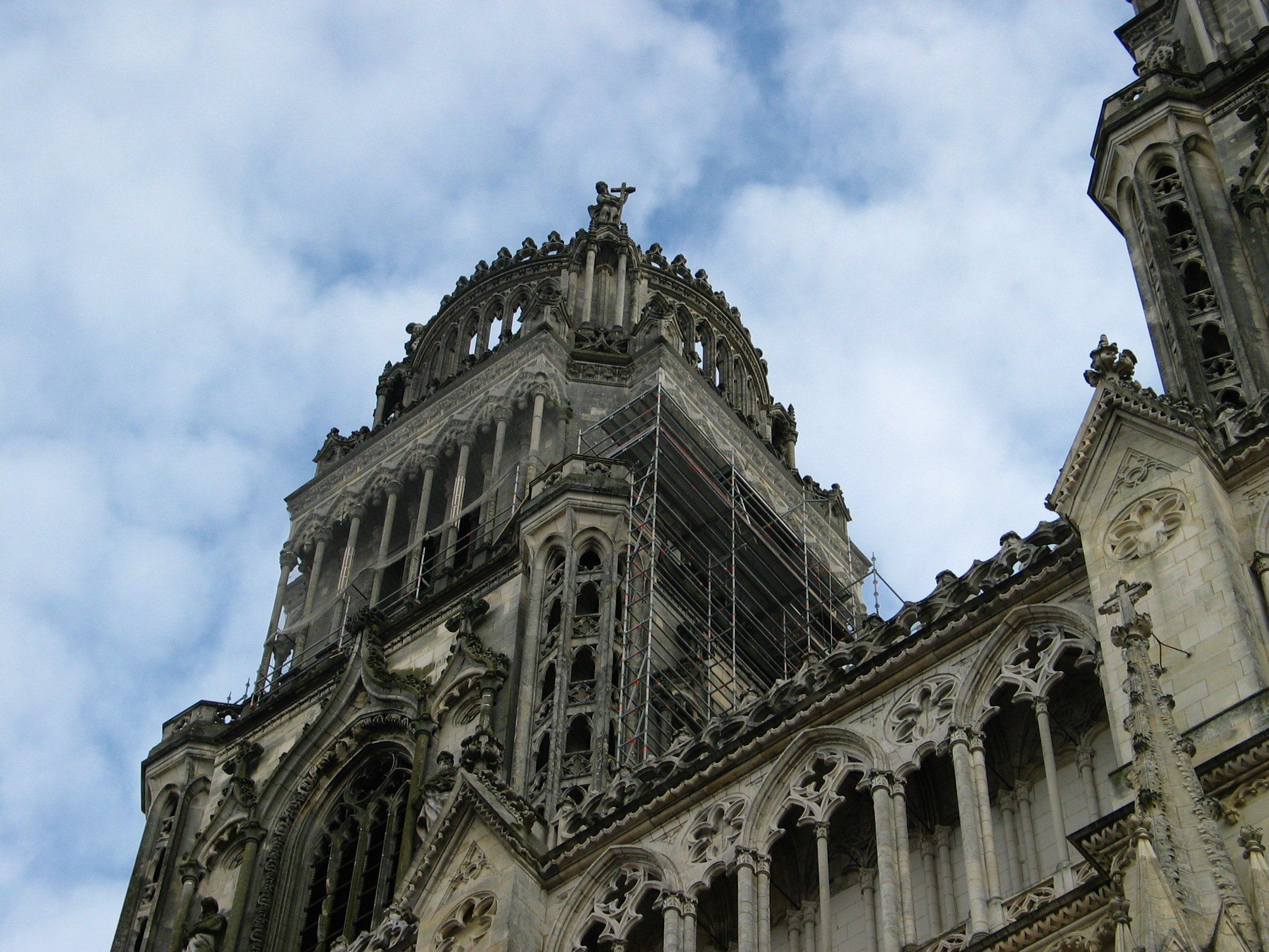 échafaudage mis en place par des cordistes le long de la tour nord de la cathédrale Sainte-Croix d'Orléans.